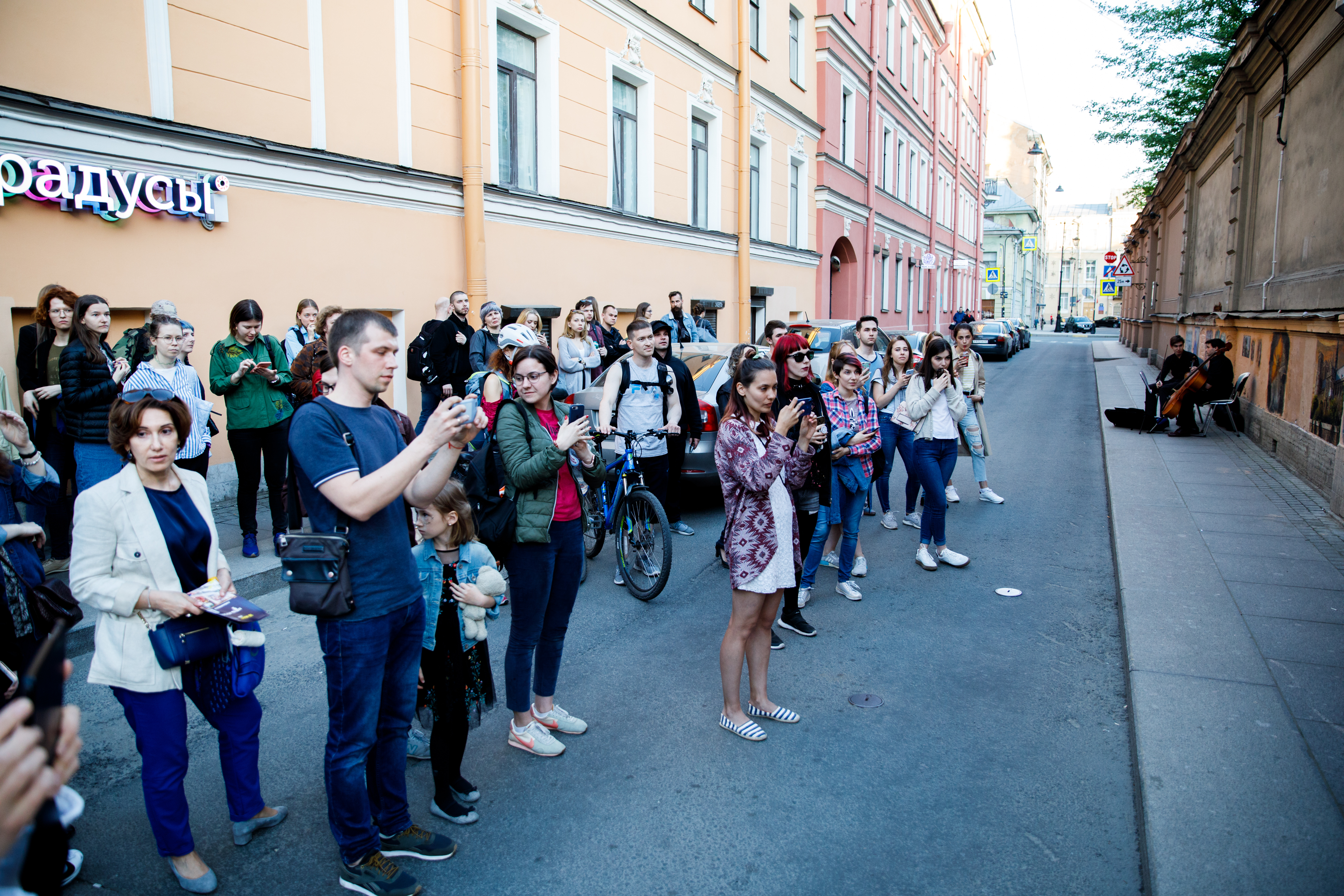 Urbanfresco - музей под открытым небом